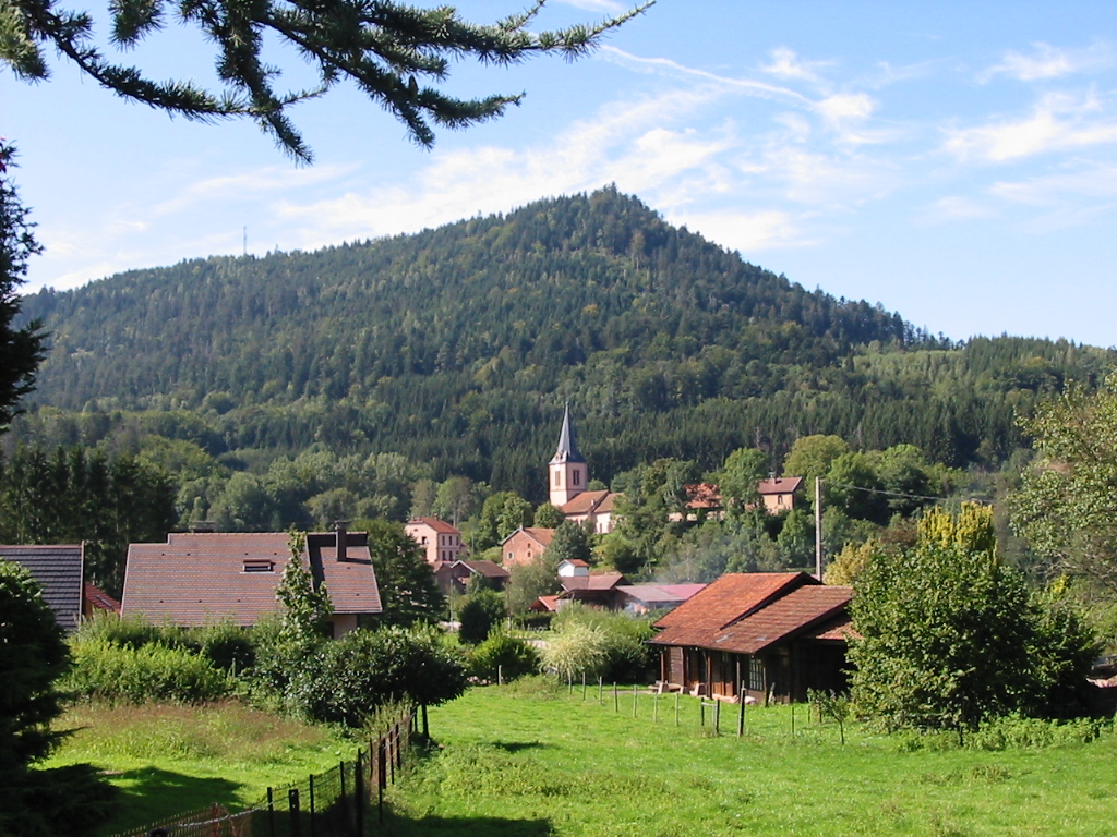 Le Saulcy, commune des Vosges. L'église est partagée avec Le Mont et Belval. Au fond, la Côte du Mont (731 m).